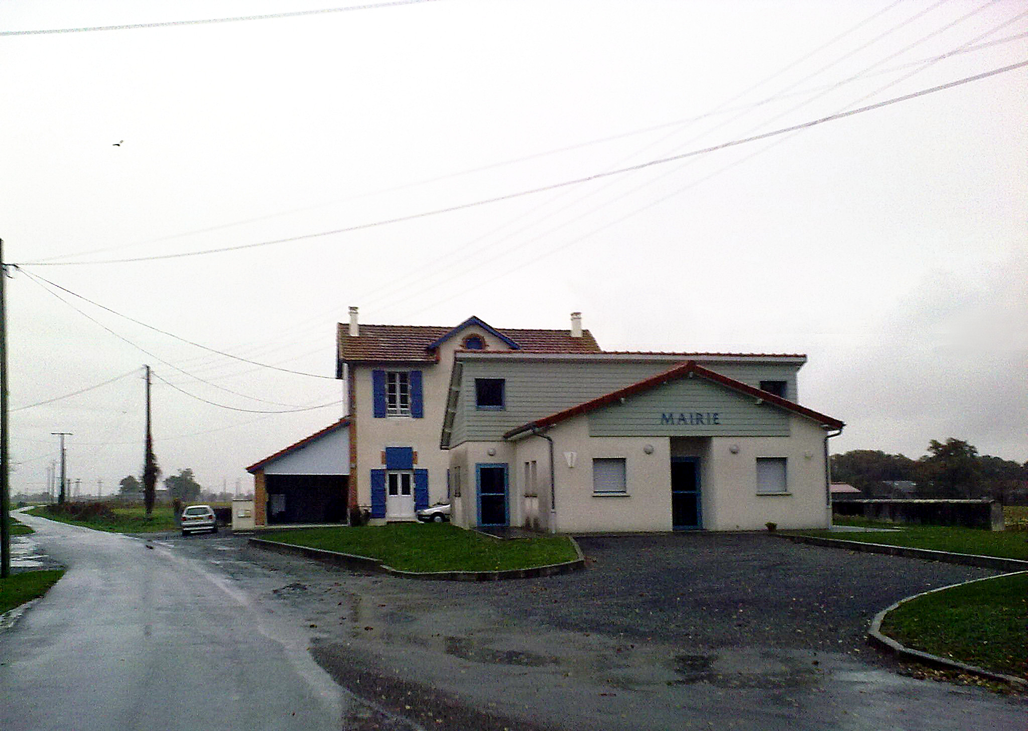 Mouhous, France.